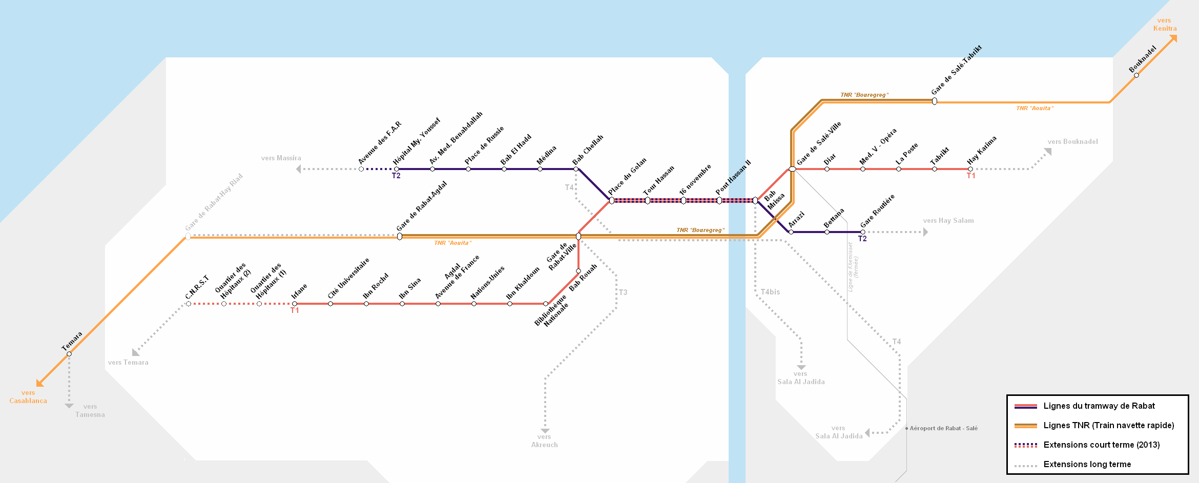 Schéma des lignes du tramway de Rabat-Salé intégrée au schéma des lignes ferroviaires